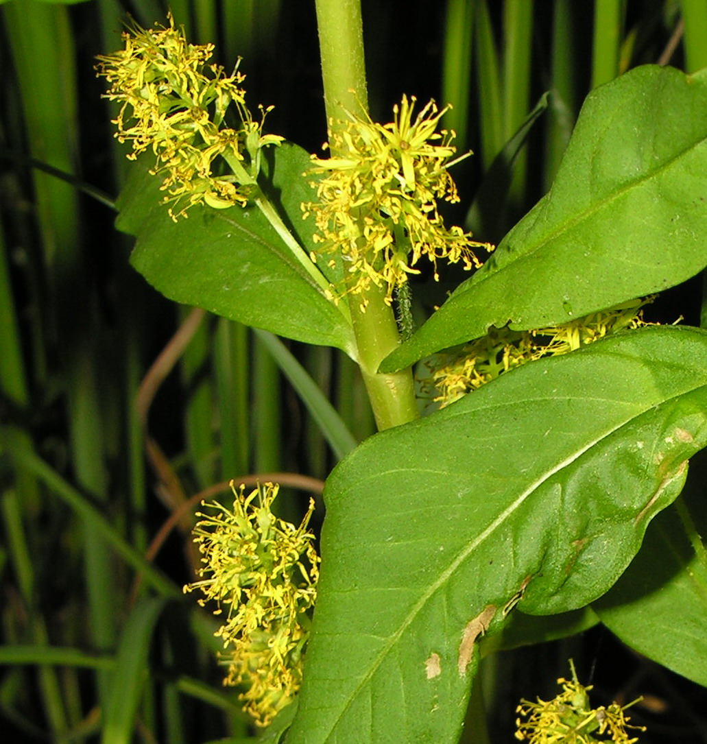 Puokštinė poraistė (Lysimachia thyrsiflora), žiedai Šeima. Mirsininiai (Myrsinaceae) Foto: Algirdas, 2006 m. birželio 25 d., Lietuva